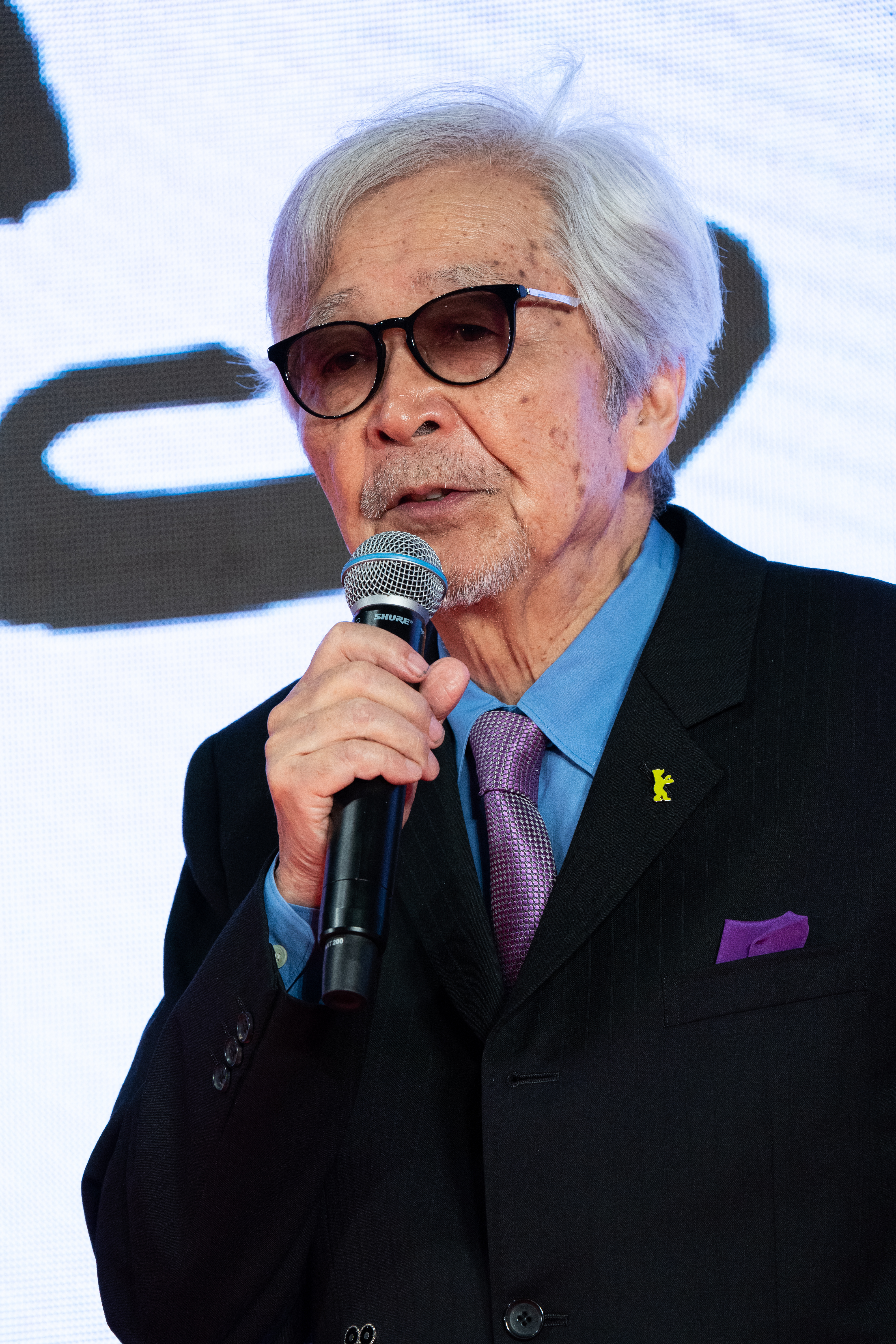 第32回 東京国際映画祭 オープニングセレモニー 山田洋次 (男はつらいよ お帰り 寅さん)